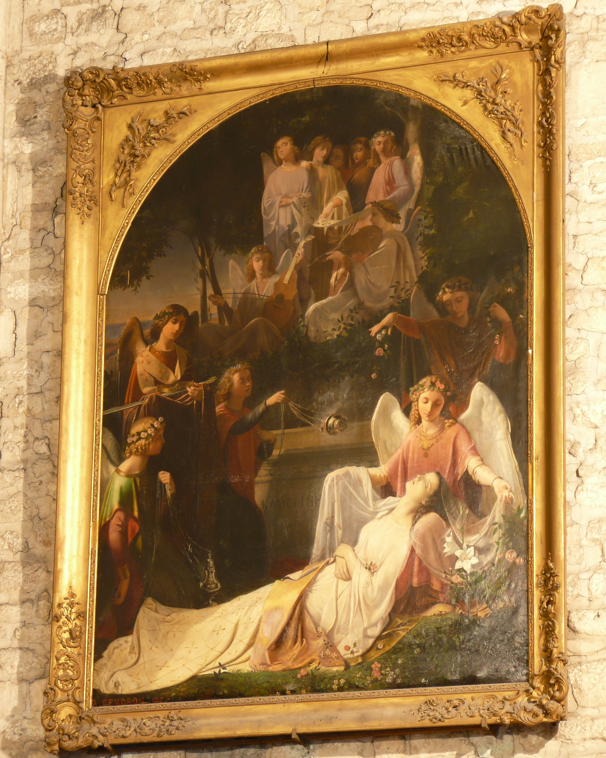 Saint-Gilles (Gard, France), intérieur de l'ancienne église abbatiale, aujourd'hui paroissiale. Quatrième toile du chœur (en partant de la gauche), le corps de Ste Catherine d'Alexandrie veillé par des anges par Auguste Gendron en 1846.